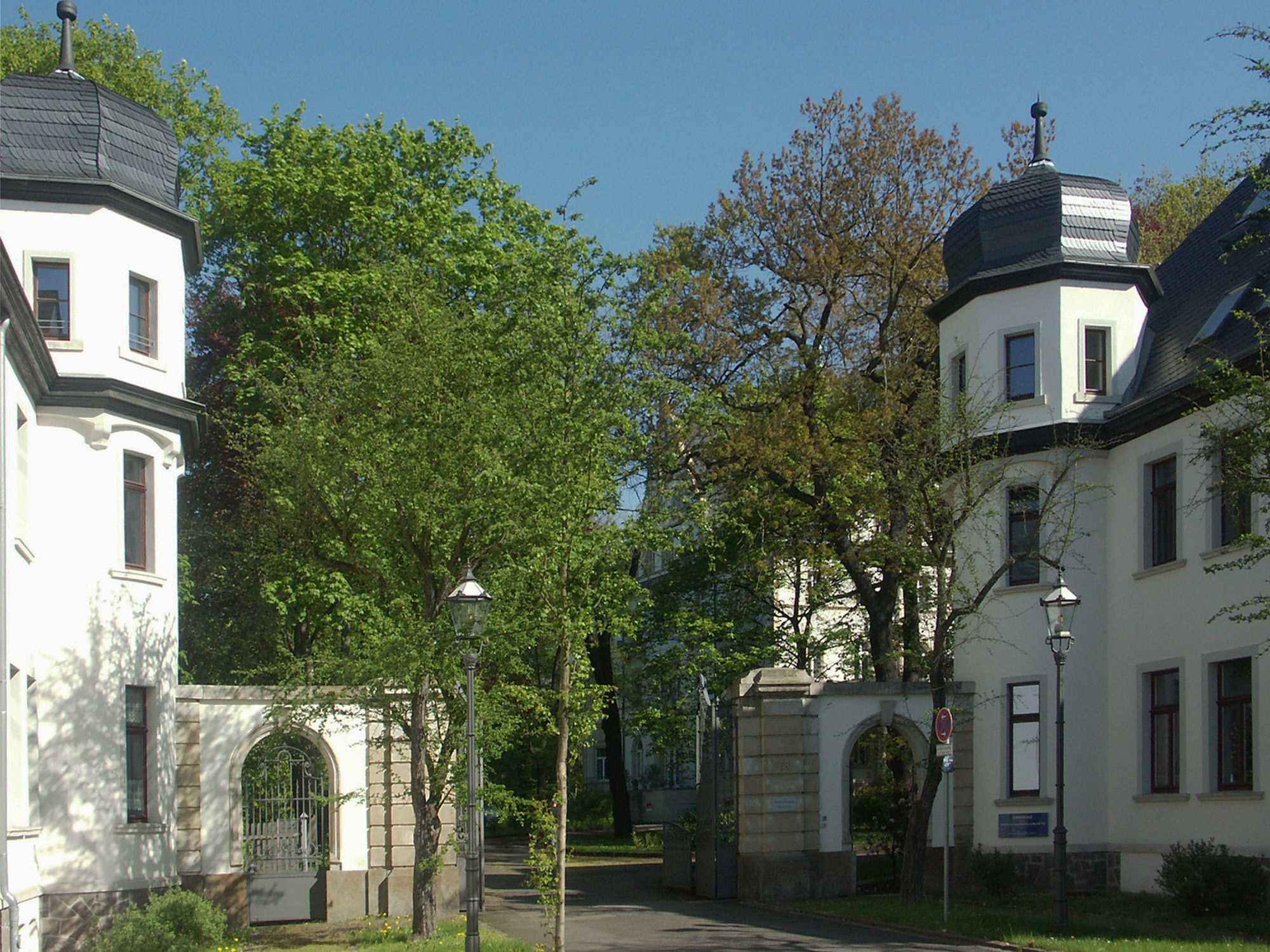 Eingangsbereich zum Areal des Abtnaundorfer Schlosses